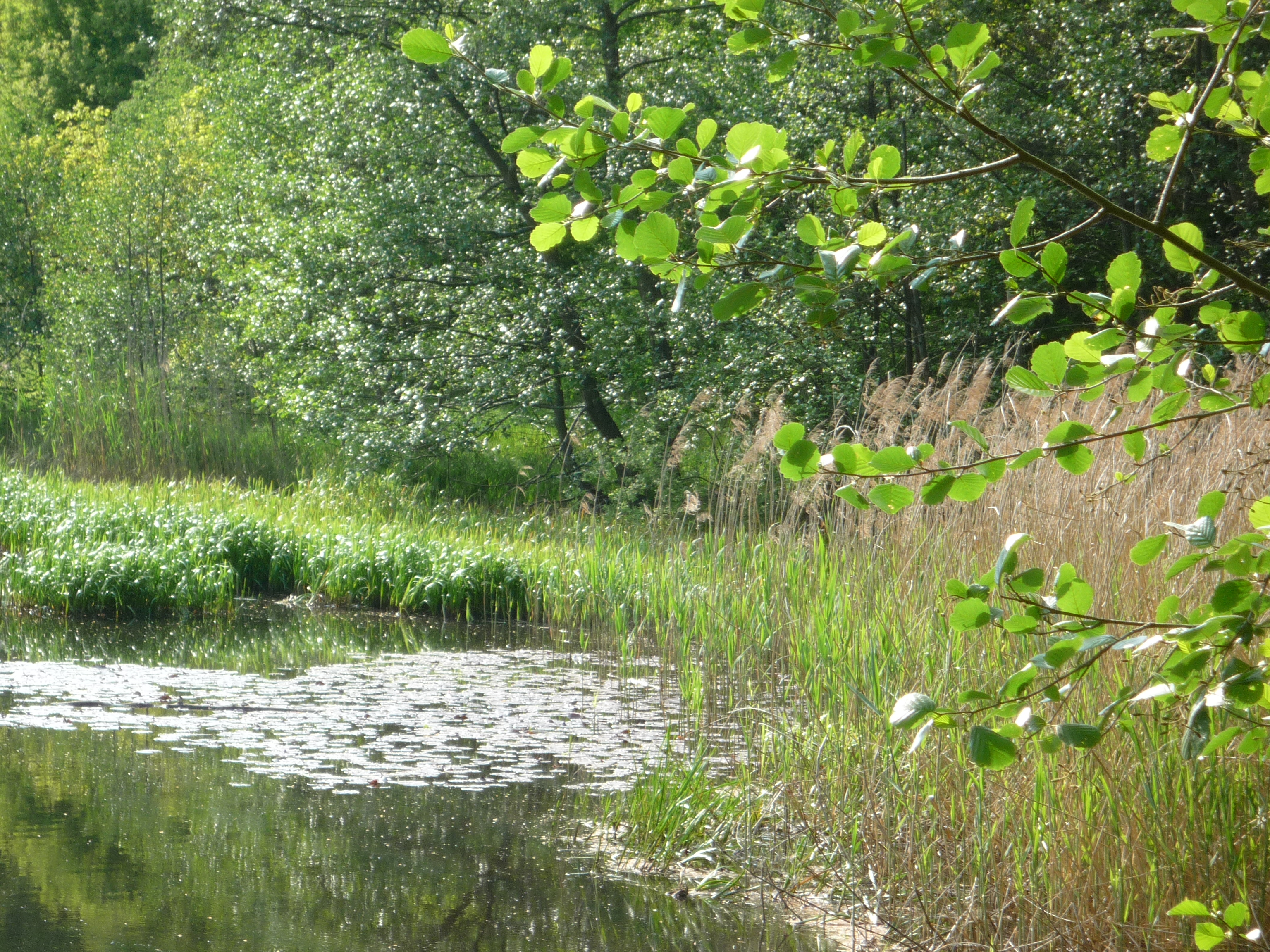 Verlandungszone im NSG Neuhäuseler Arm, Saarland